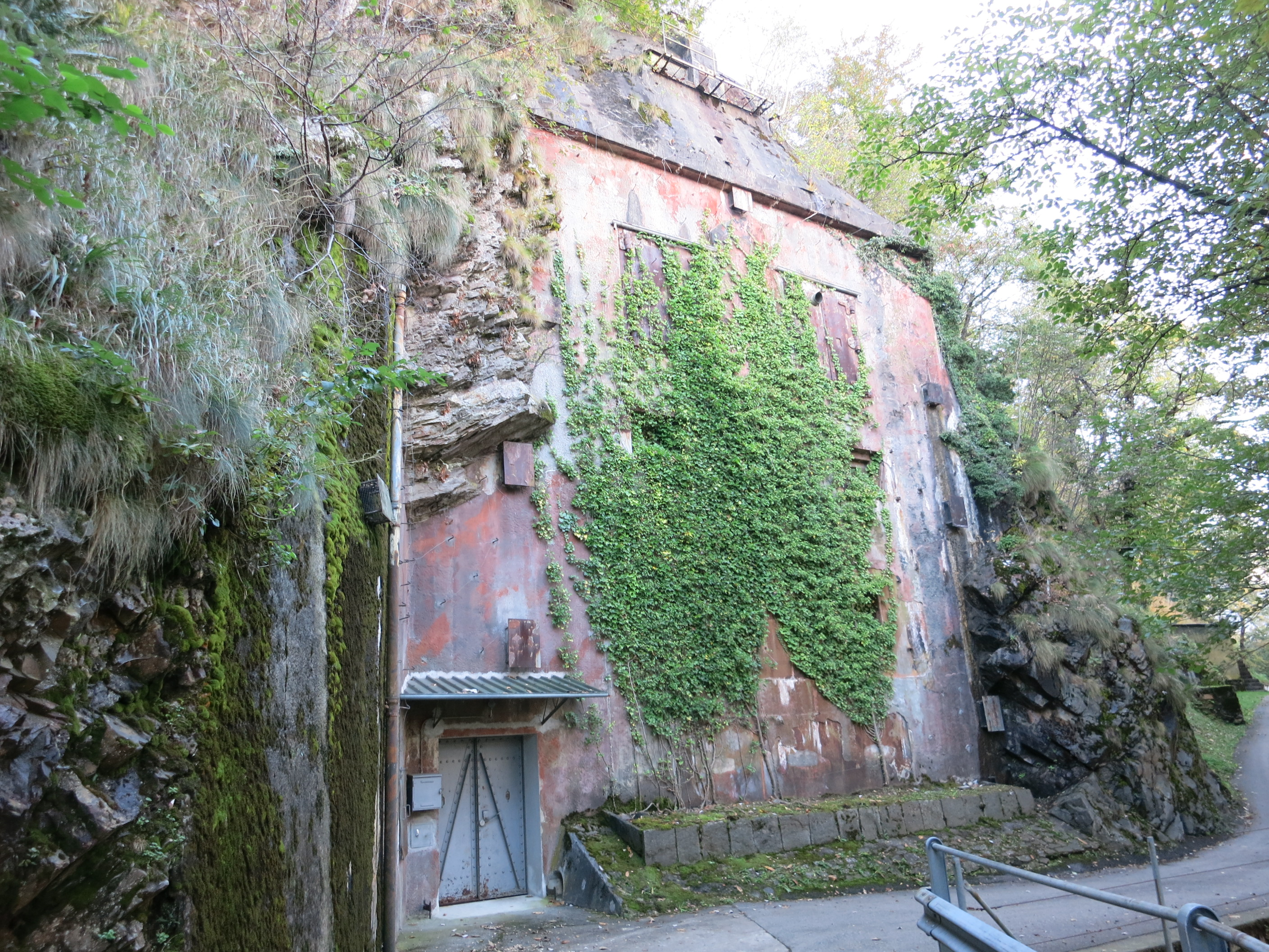 Sperrstelle Monte Ceneri TI, Schweiz